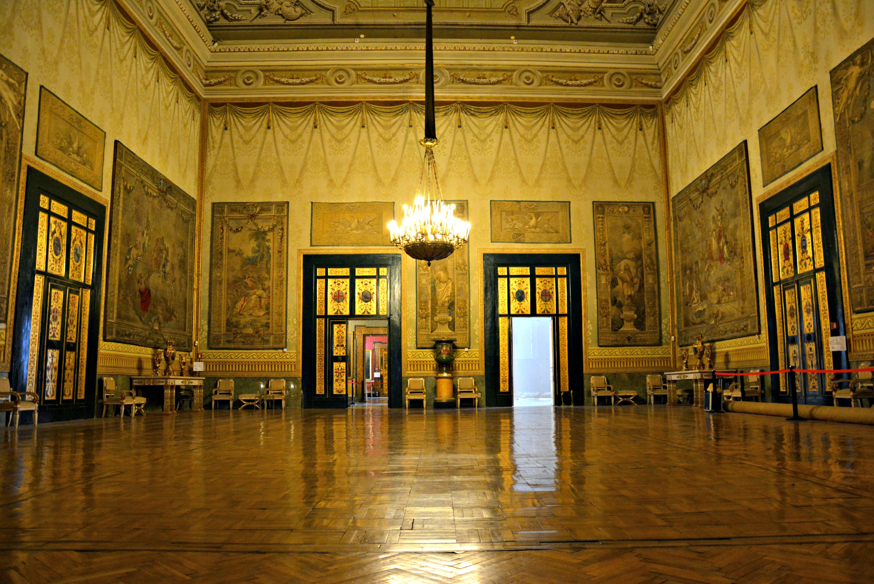 Vedi titolo